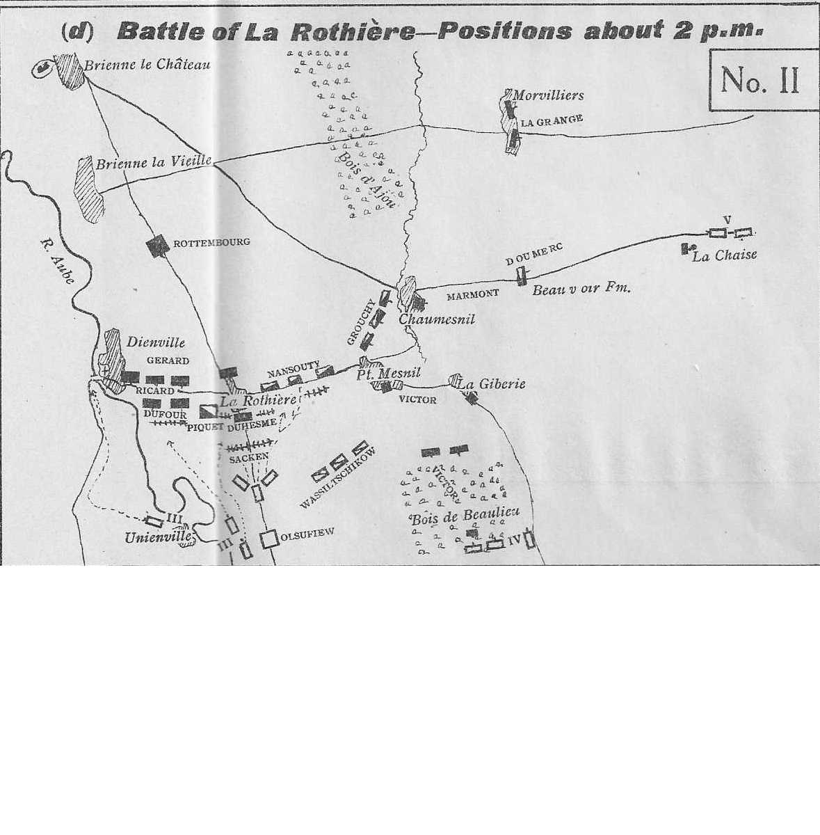 Stellung der Truppen in der Schlacht bei La Rothière am 1.2.1814 um 14:00 Uhr